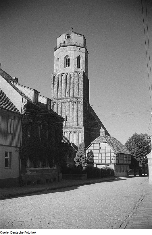 Original image description from the Deutsche Fotothek Stadtkirche von Calau